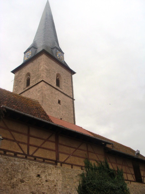 Kirche St. Sigismund, Kirchhofbefestigung, Marktplatz 1, Kolitzheim-Zeilitzheim, Chorturmkirche, im Kern 14./15. Jh., das Langhaus im 17. Jh. verändert; mit Ausstattung; Kirchhofbefestigung mit Gadenanlage, im Kern 1. Hälfte 15. Jh.; D-6-78-150-130/ D-6-78-150-131